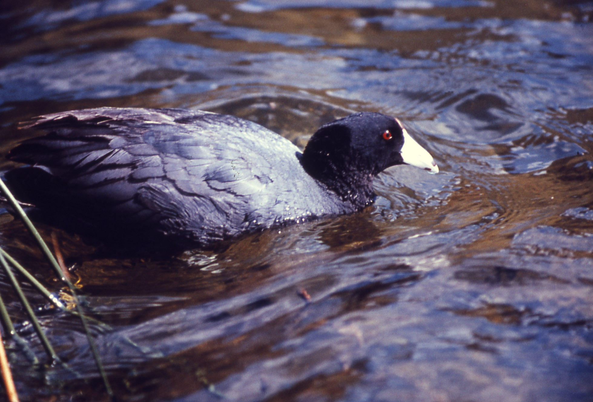 American coot (Fulica americana)